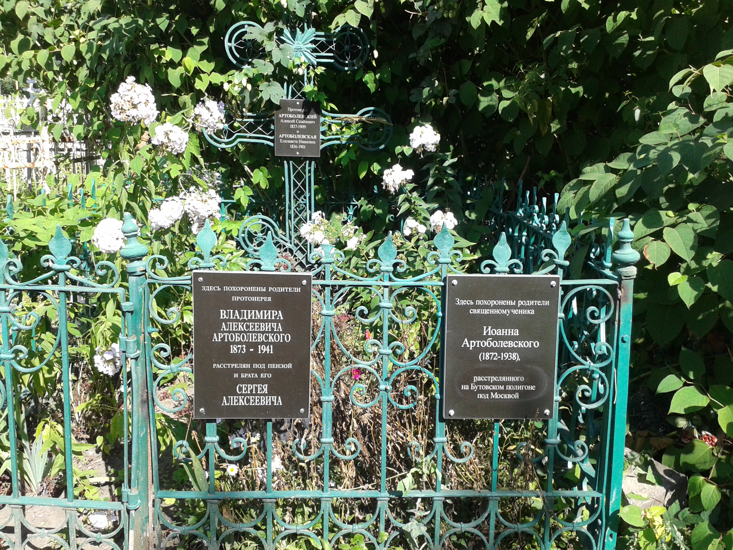 Могилы Алексея Семеновича Артоболевского (1837—1909), настоятеля Митрофановской церкви Митрофановского кладбища г. Пензы и Елизаветы Ивановны Артоболевской (1836—1901) - родителей священномученика Иоанна Артоболевского. Митрофановское кладбище, г. Пенза.